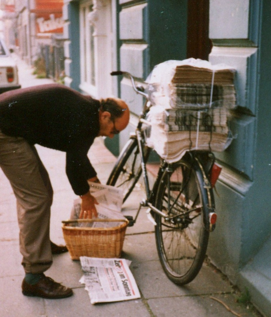 einfaches SPD-Mitglied trägt Wahlzeitung ZAS (Zeitung am Sonntag)in Hamburg ehrenamtlich aus